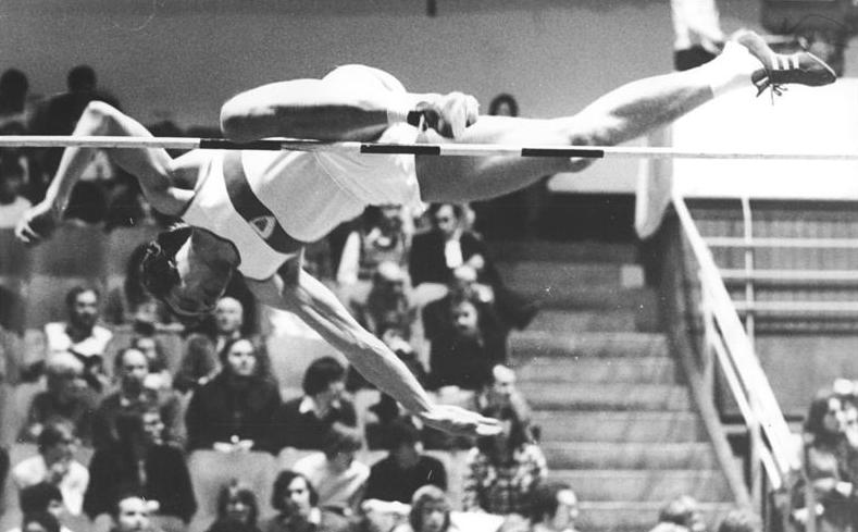 Rolf Beilschmidt ADN-ZB Mittelstädt 5.3.77 Berlin: DDR-Leichtathletikmeisterschaften in der Dynamo-Sporthalle. Höhepunkt des ersten Tages der Meisterschaften war der Hochsprung der Männer. Hier stellte Rolf Beilschmidt (SC Motor Jena) als Sieger mit 2,25 Metern die von dem Jenaer kürzlich erzielte DDR-Bestleistung ein.